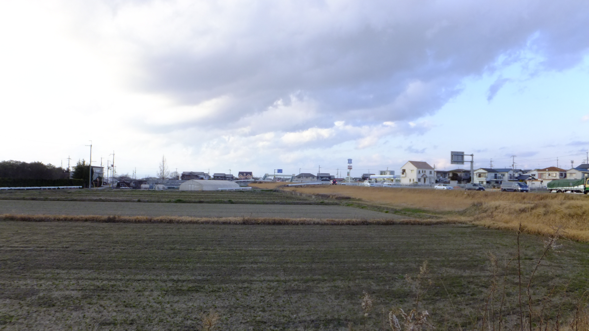 兵庫県神戸市西区神出町田井